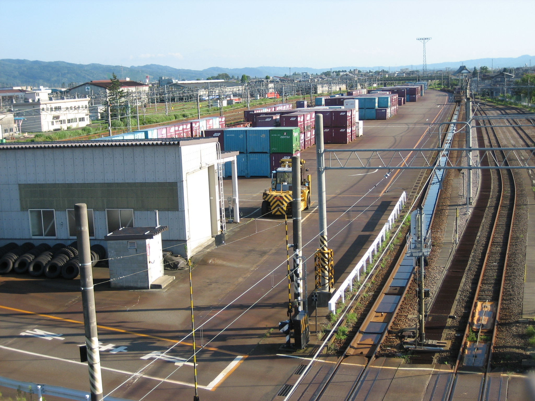 南長岡駅コンテナヤード